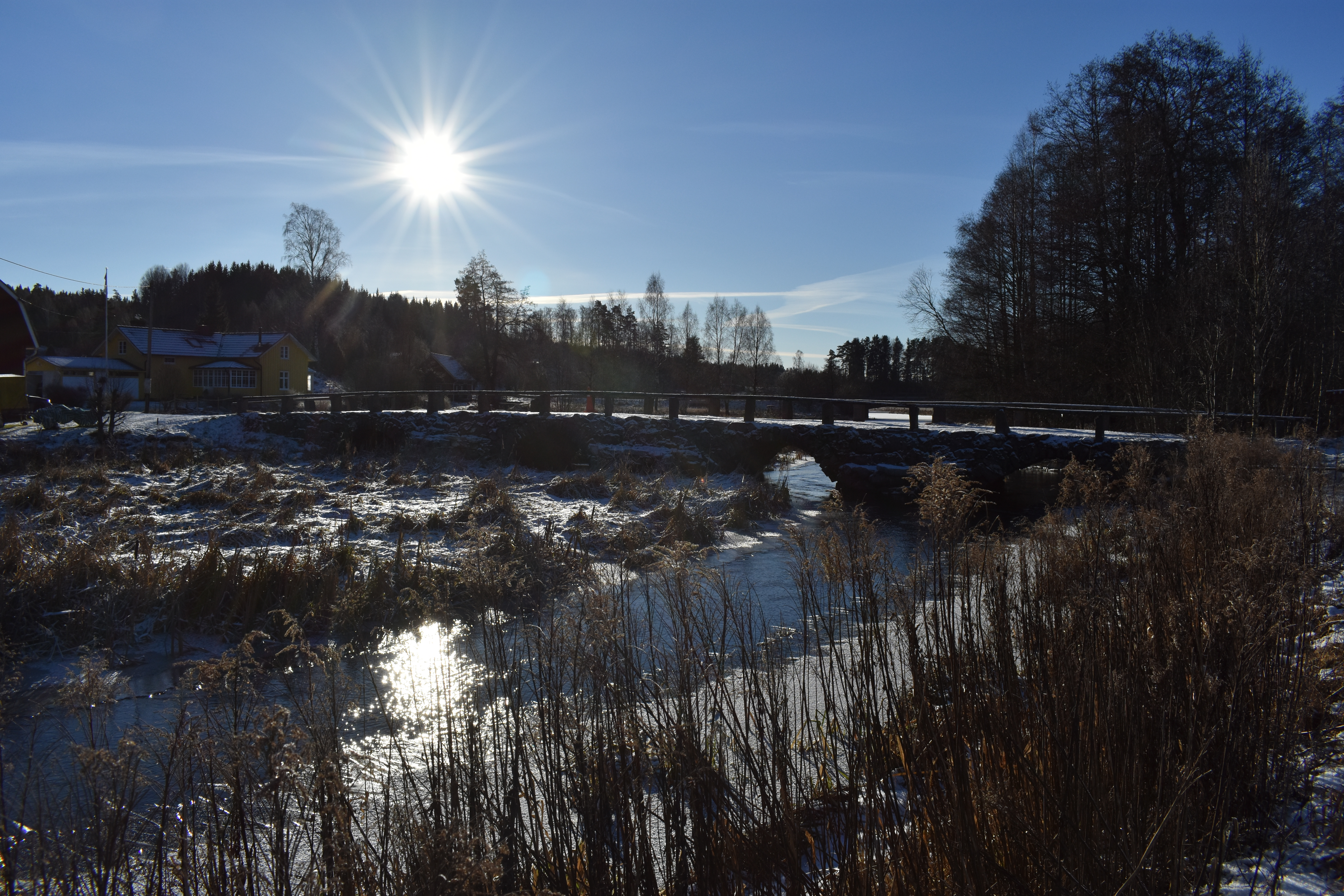 Stenvalvsbron över Ätran I humla är uppbyggd av hårt tuktad gråsten i fyra spann. Den byggdes 1862-1872 av Wik från Vedåsla i Dalum. Stenvalvsbron har fyra valv som är gjorda i råhuggen kallmurad granit. Under 1980-talet disskuerades det om man skulle riva bron då den inte kunde klara tunga transporter. Istället byggdes en ny bor för trafik en bit nedströms. Bron är belägen 300 m sydöst om Humla Kyrka på östra sidan om väg 46. Den syns bäst från nya bron men för att komma nära, gå 50-100 m på grusvägen mitt emot parkeringsfickan.